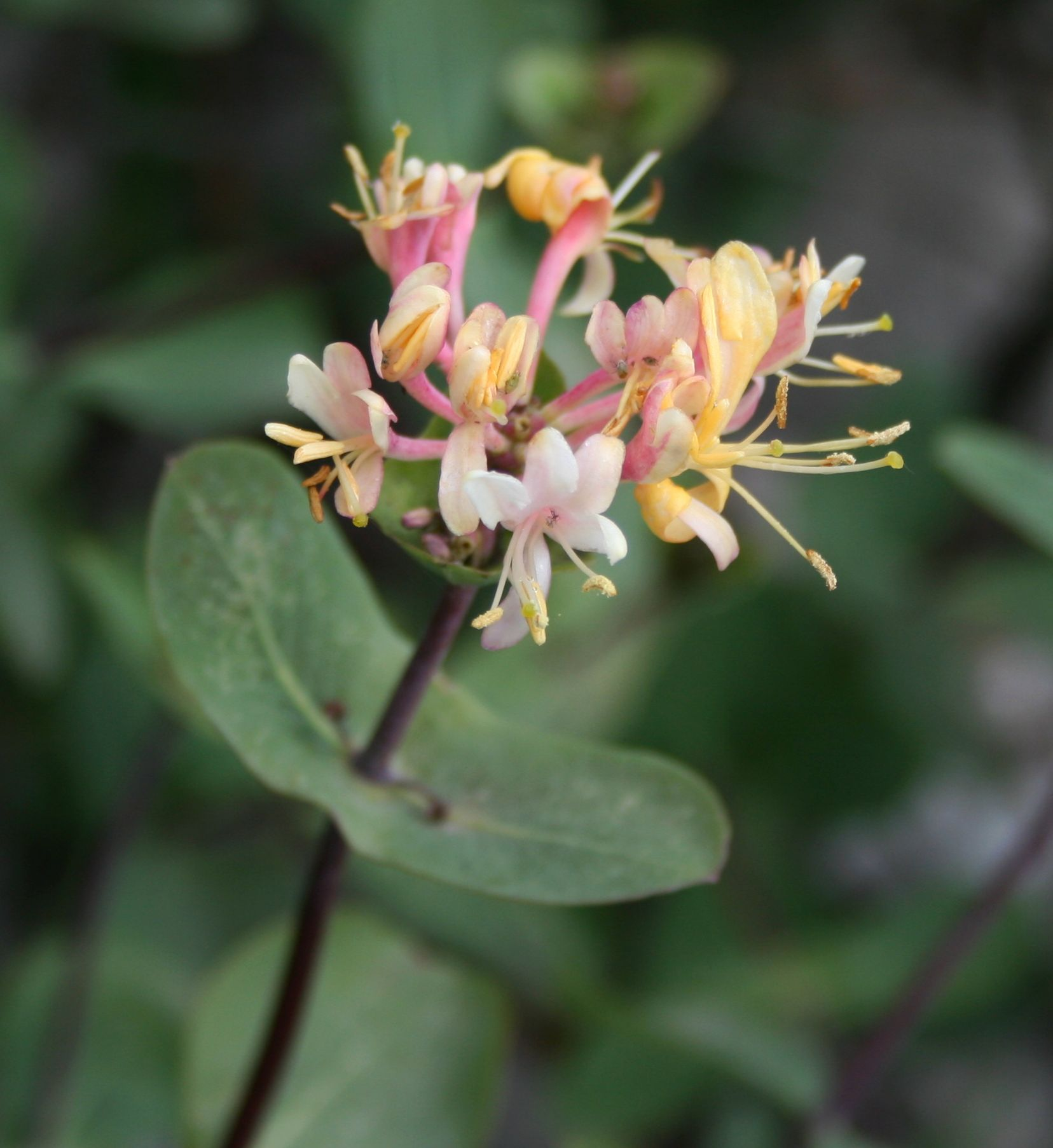 Lonicera etrusca, Geißblattgewächse (Caprifoliaceae) - Italien/Italia/Italy: Friuli-Venezia Giulia, Prov. Trieste, Rilkeweg/Sentiero Rilke von Sistiana nach Duino